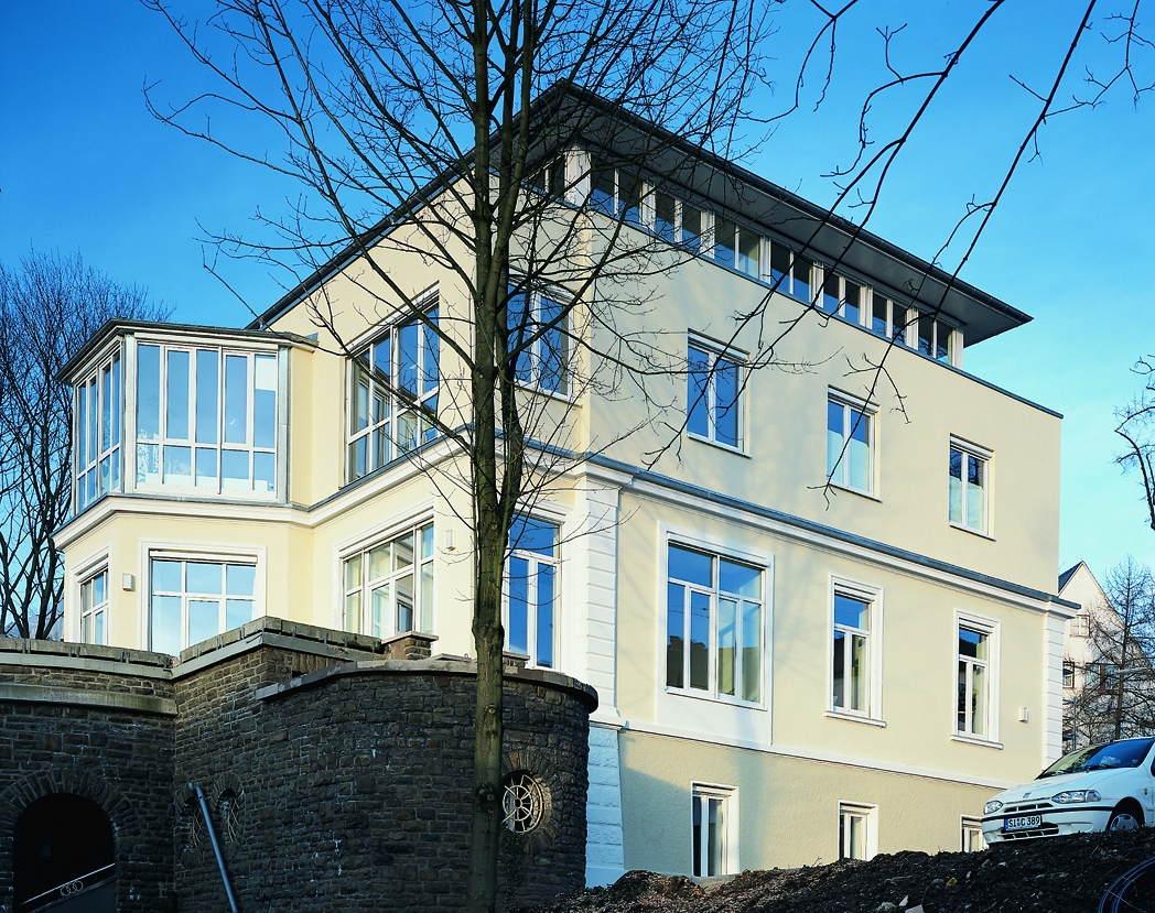 Villa Waldrich in Siegen im Jahr 2000, Außenansicht